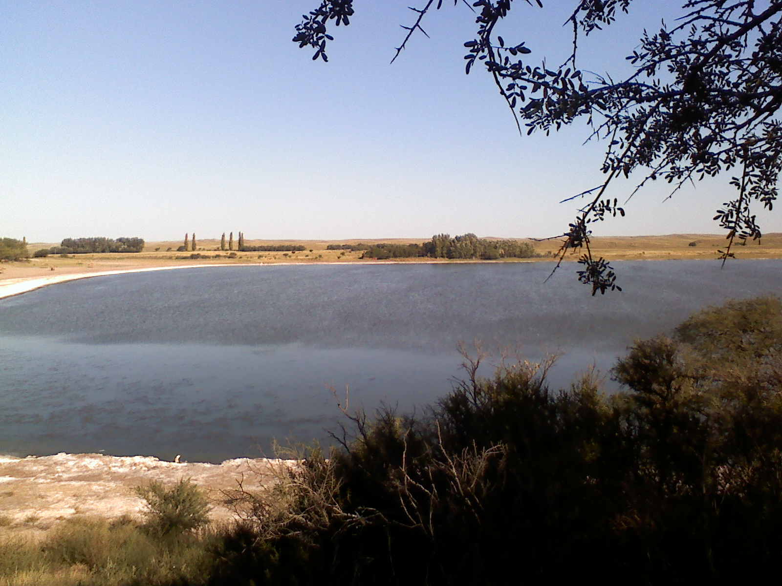 Laguna de Utracan, en la provincia de La Pampa, Argentina